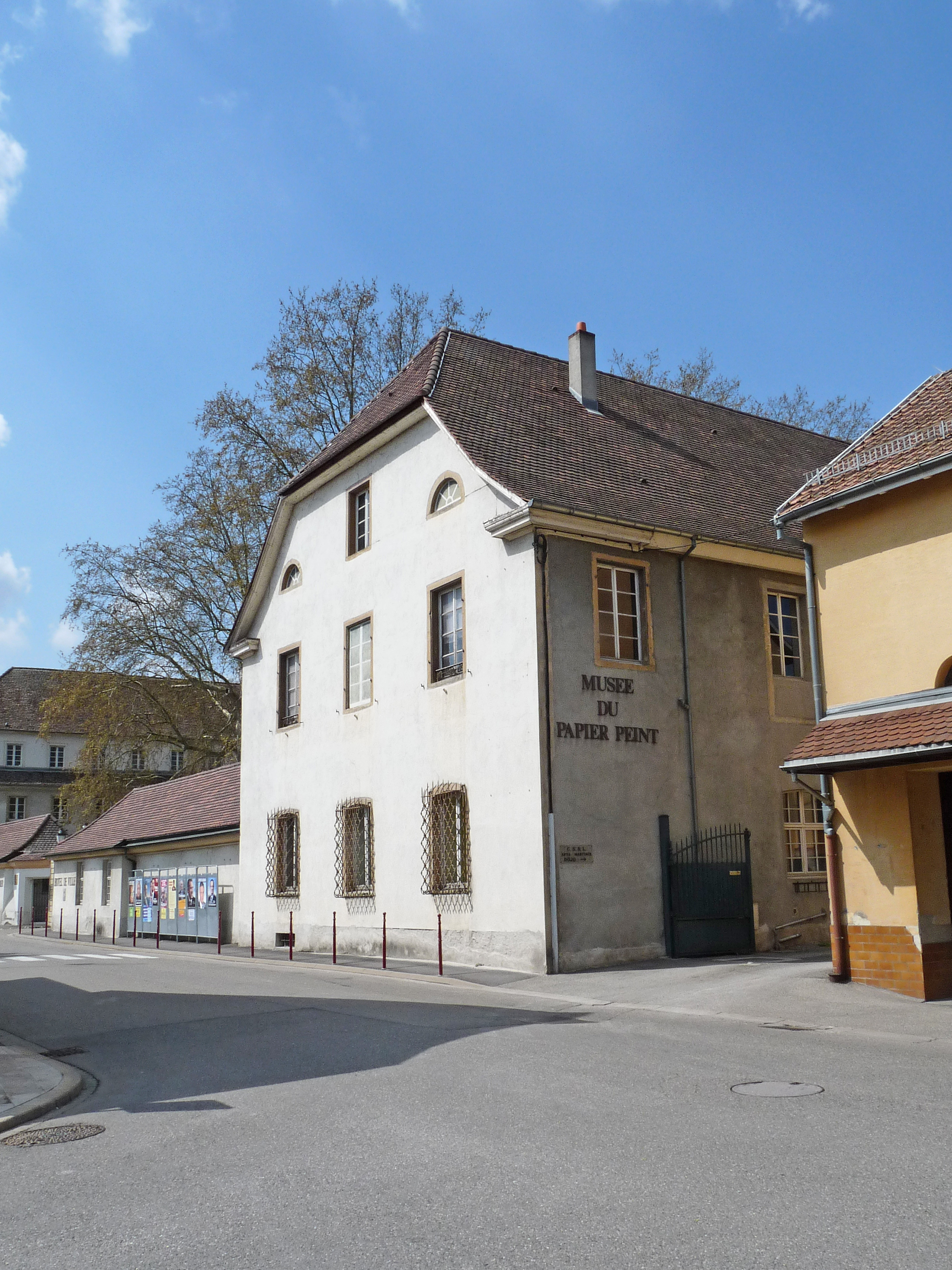 Rixheim (Haut-Rhin) : Musée du papier peint, aménagé dans l'aile droite de l'ancienne commanderie de chevaliers teutoniques.